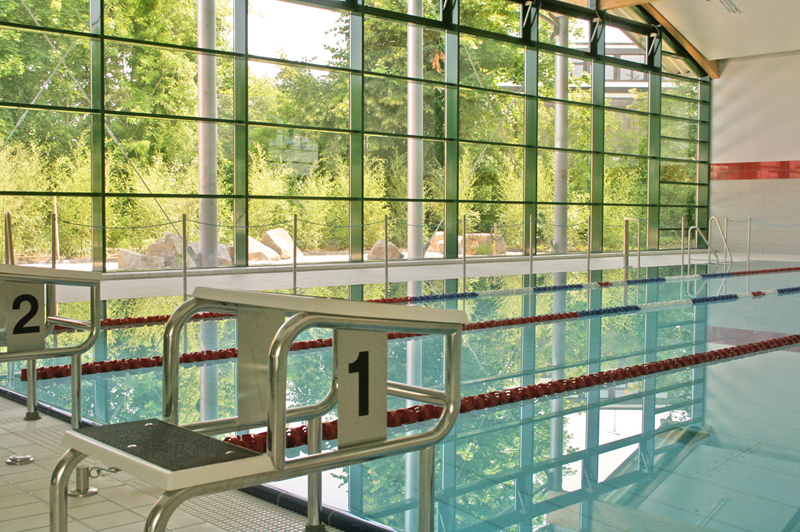 Zu sehen ist das Schwimmbad des Sportzentrum Ruhrs auf dem Gelände des Franz Sales Hauses.